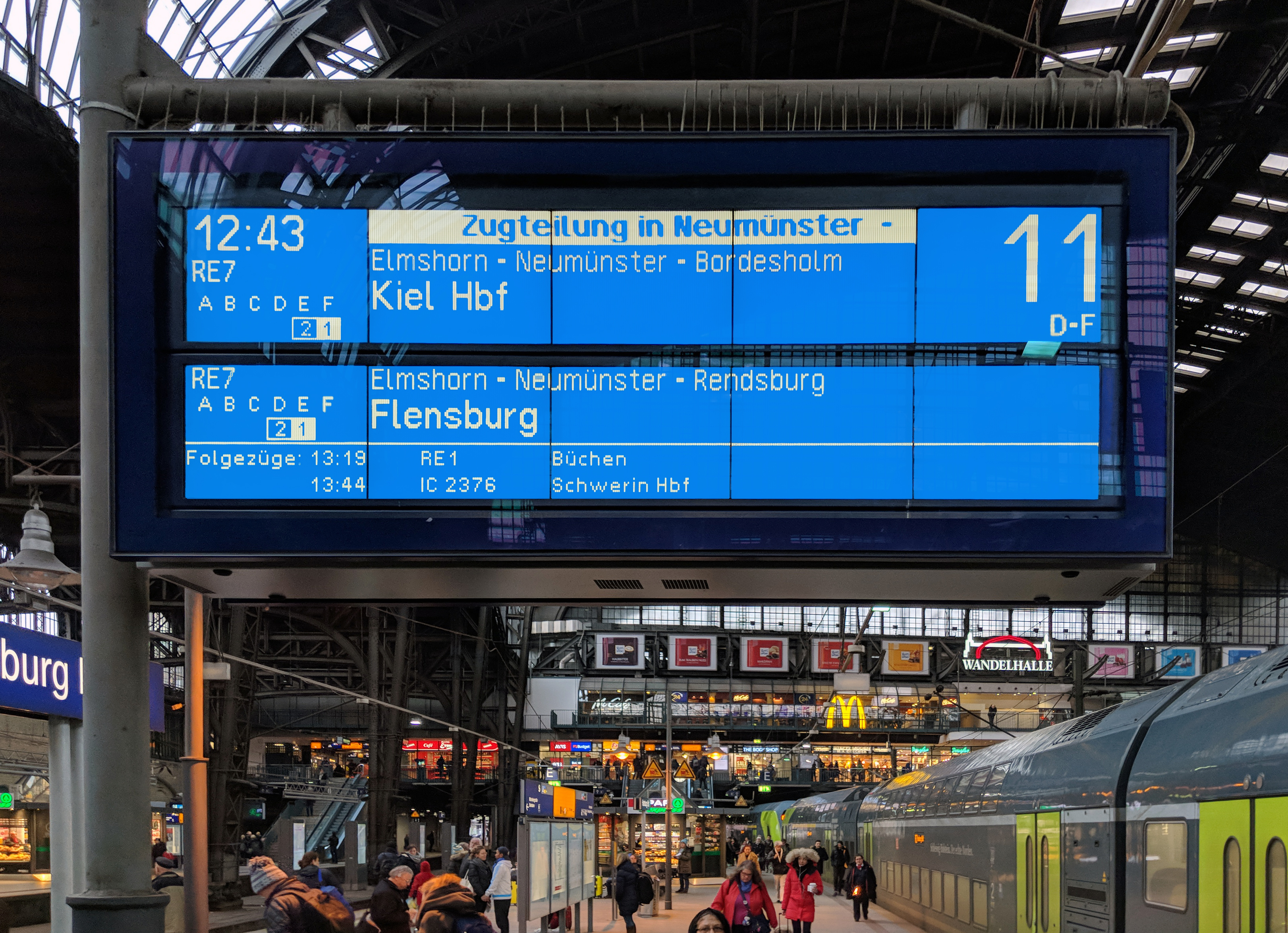 Multizugzielanzeiger am Hamburger Hbf nach Kiel und Flensburg mit Folgezügen nach Büchen und Schwerin